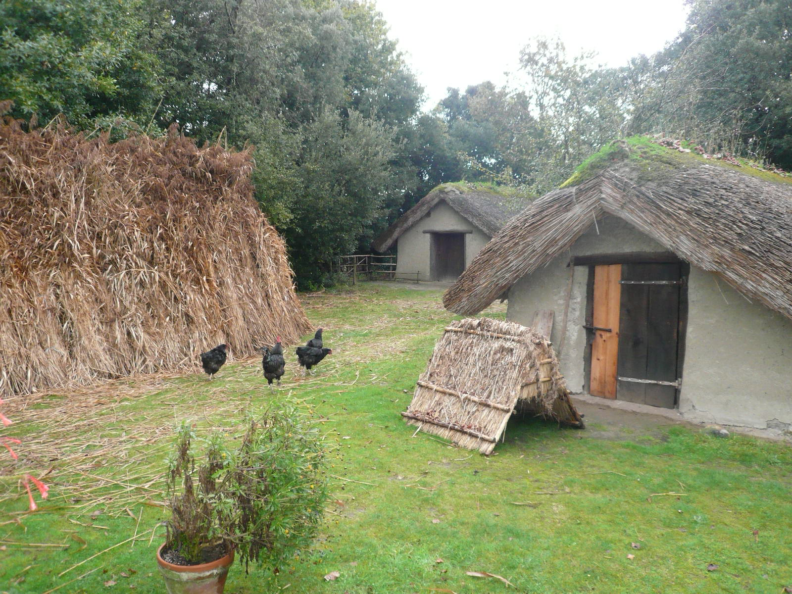 Bourrine du bois-Jucquaud bis